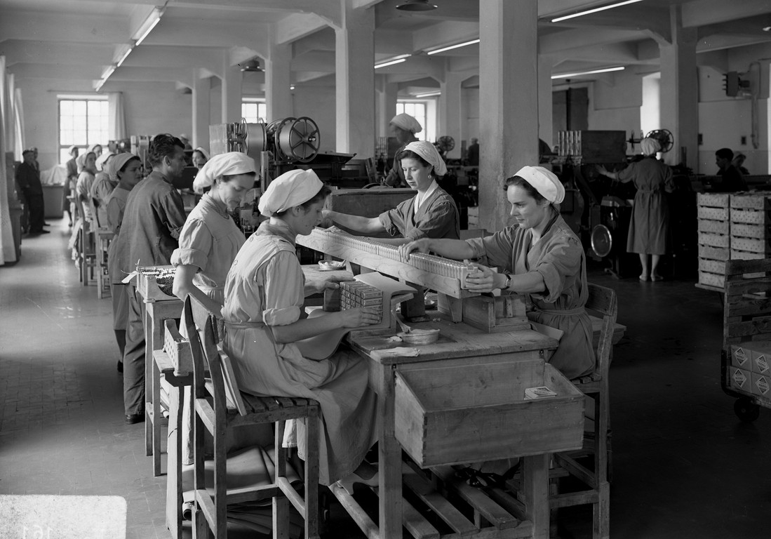 Zigherane al lavoro di impacchettamento nella Manifattura tabacchi di Borgo Sacco (SA Trentino Alto Adige, Laboratorio di Storia di Rovereto, Archivio, 1950 ca)